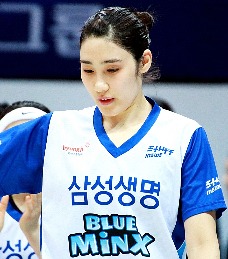 160110 여자농구 신한은행 vs 삼성생명 직찍 1